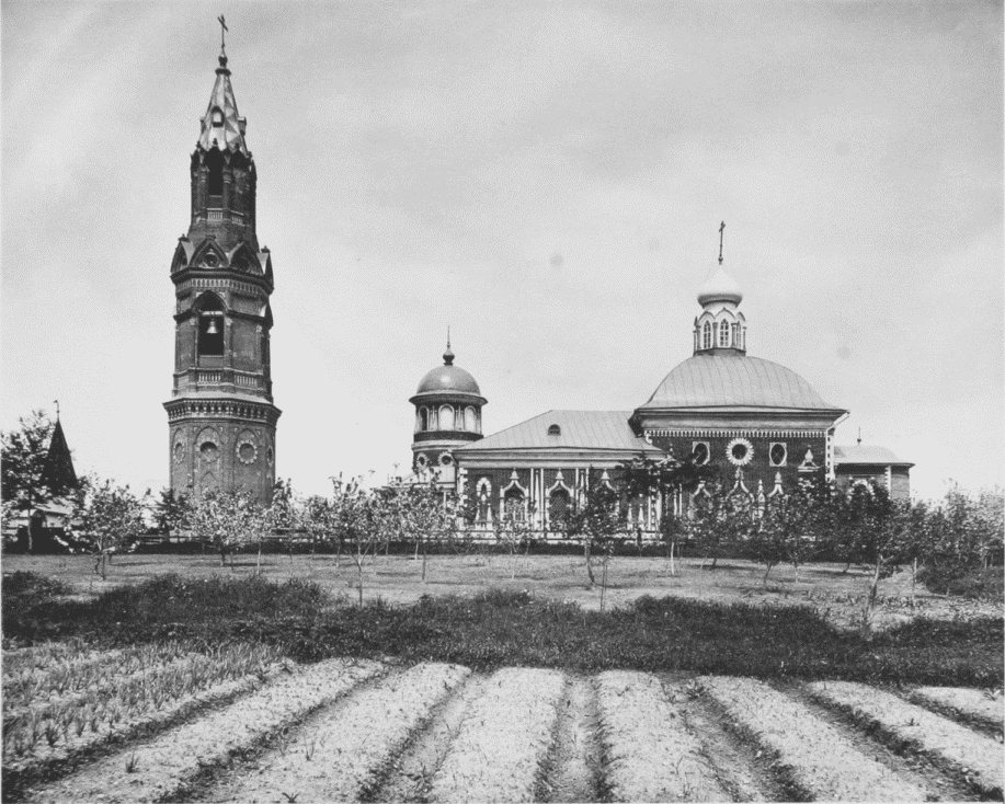 Церковь Николая Чудотворца (Успения Пресвятой Богородицы) на Преображенском кладбище